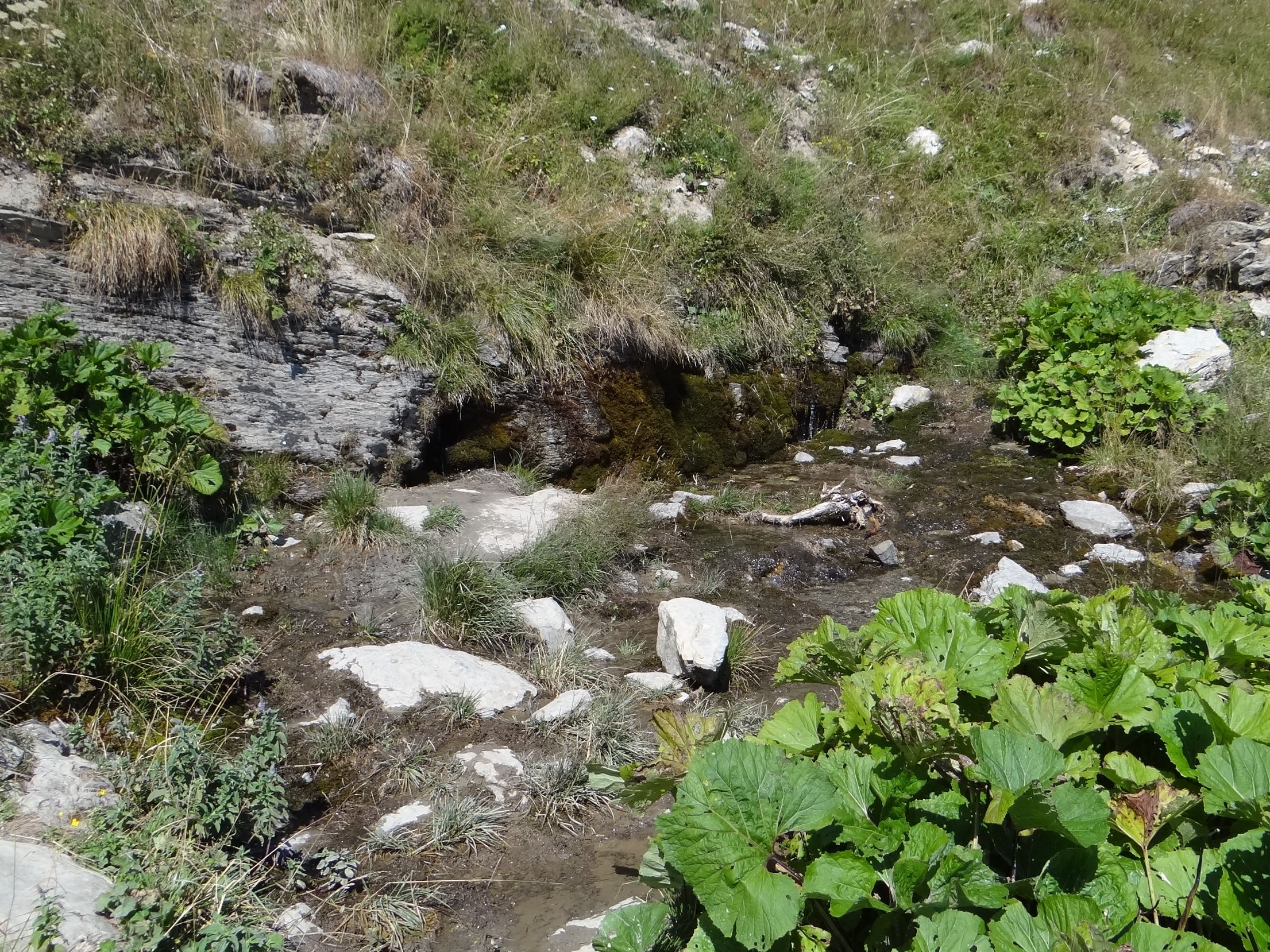 Mojžišove pramene